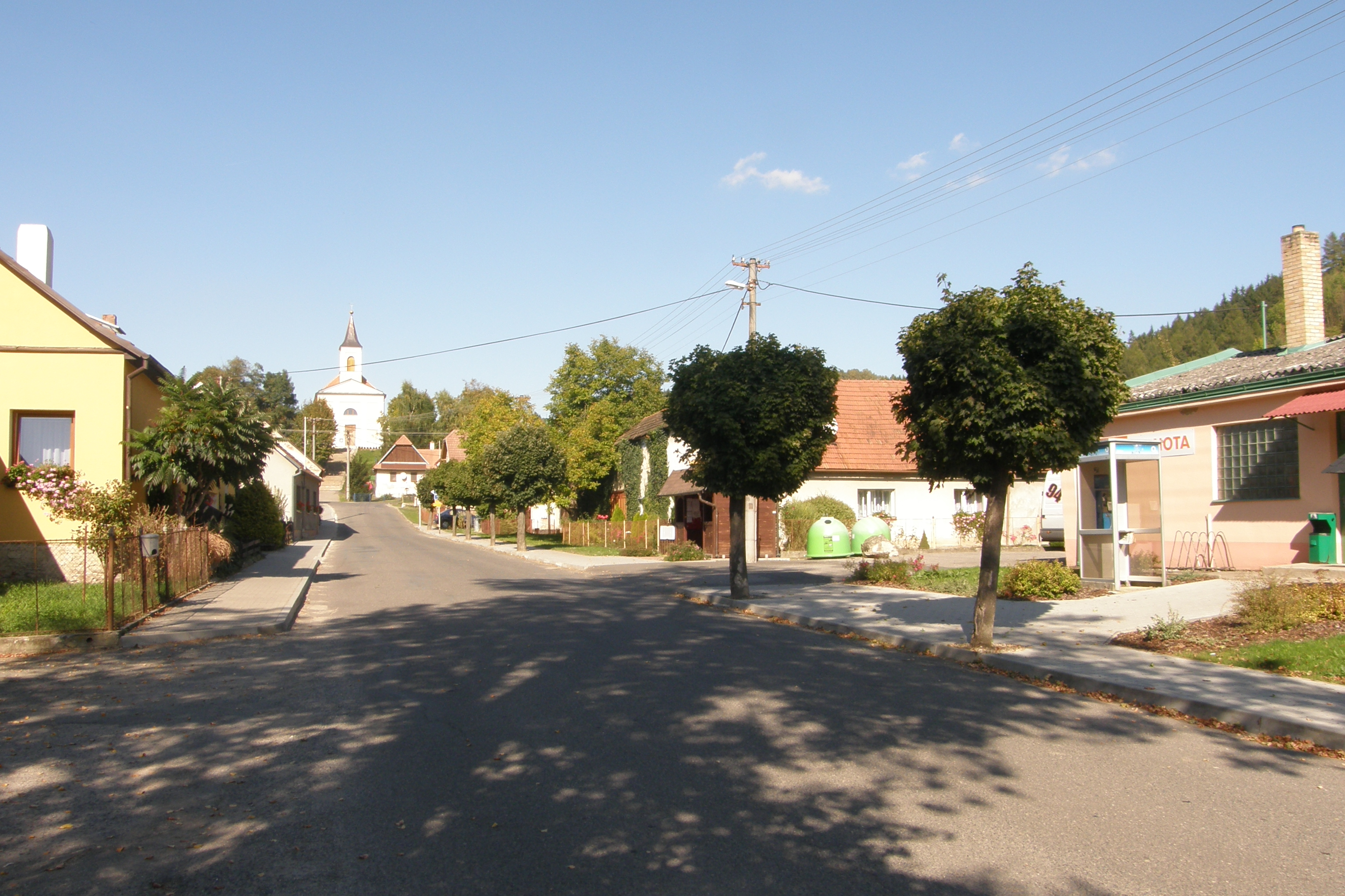 Bohuňov, v pozadí kostel sv. Jiljí